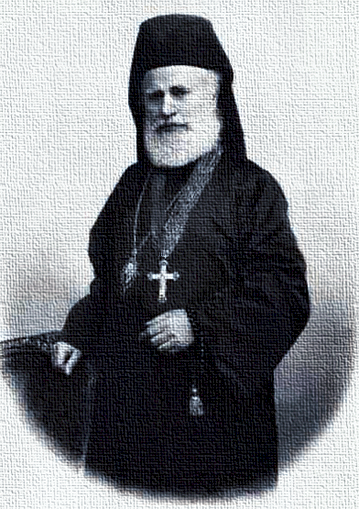 Metropolit Dr. Wladimir Ritter von Repta nach 1902